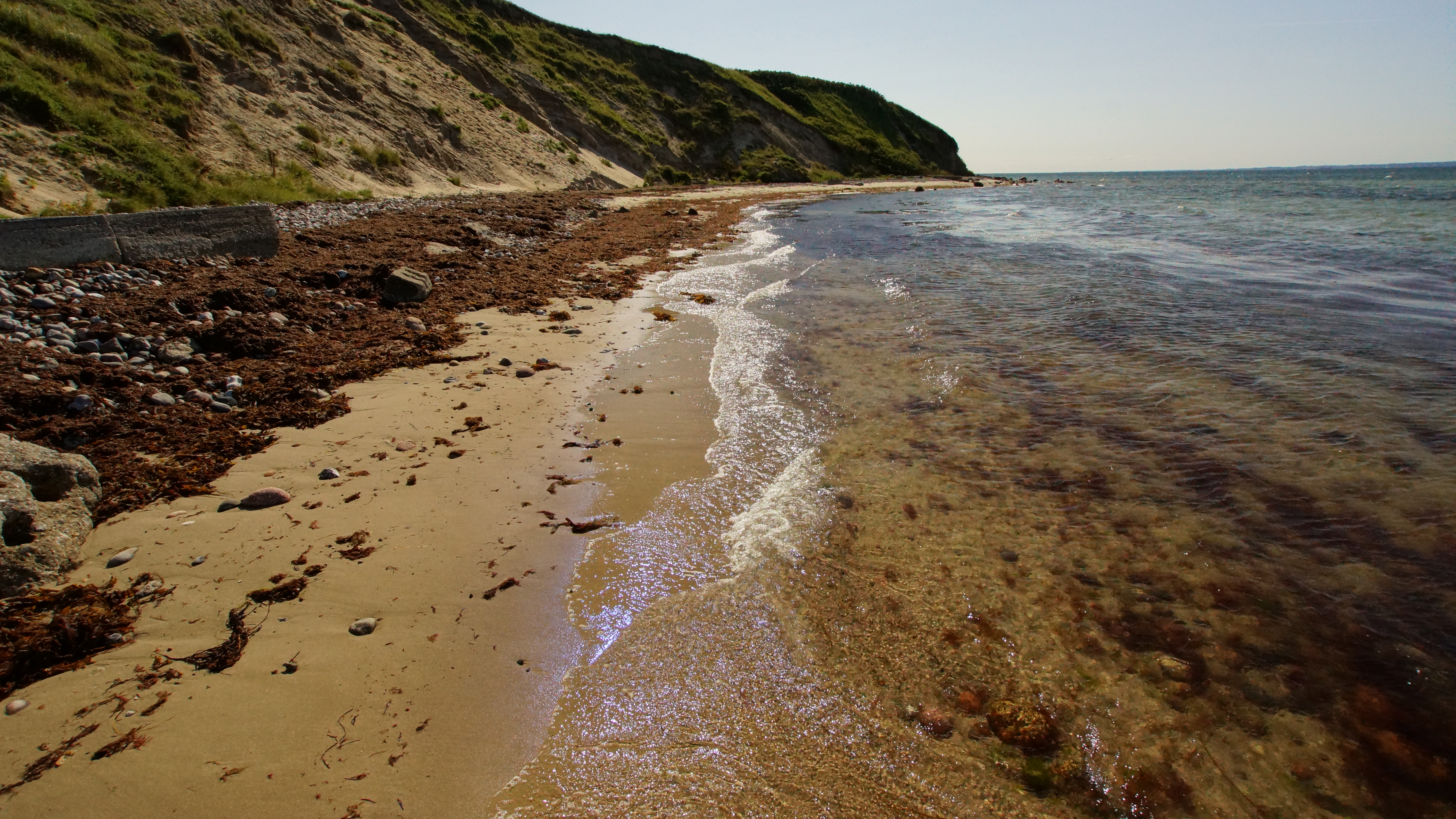 Ørby Klint, Helgenæs, nordlige ende